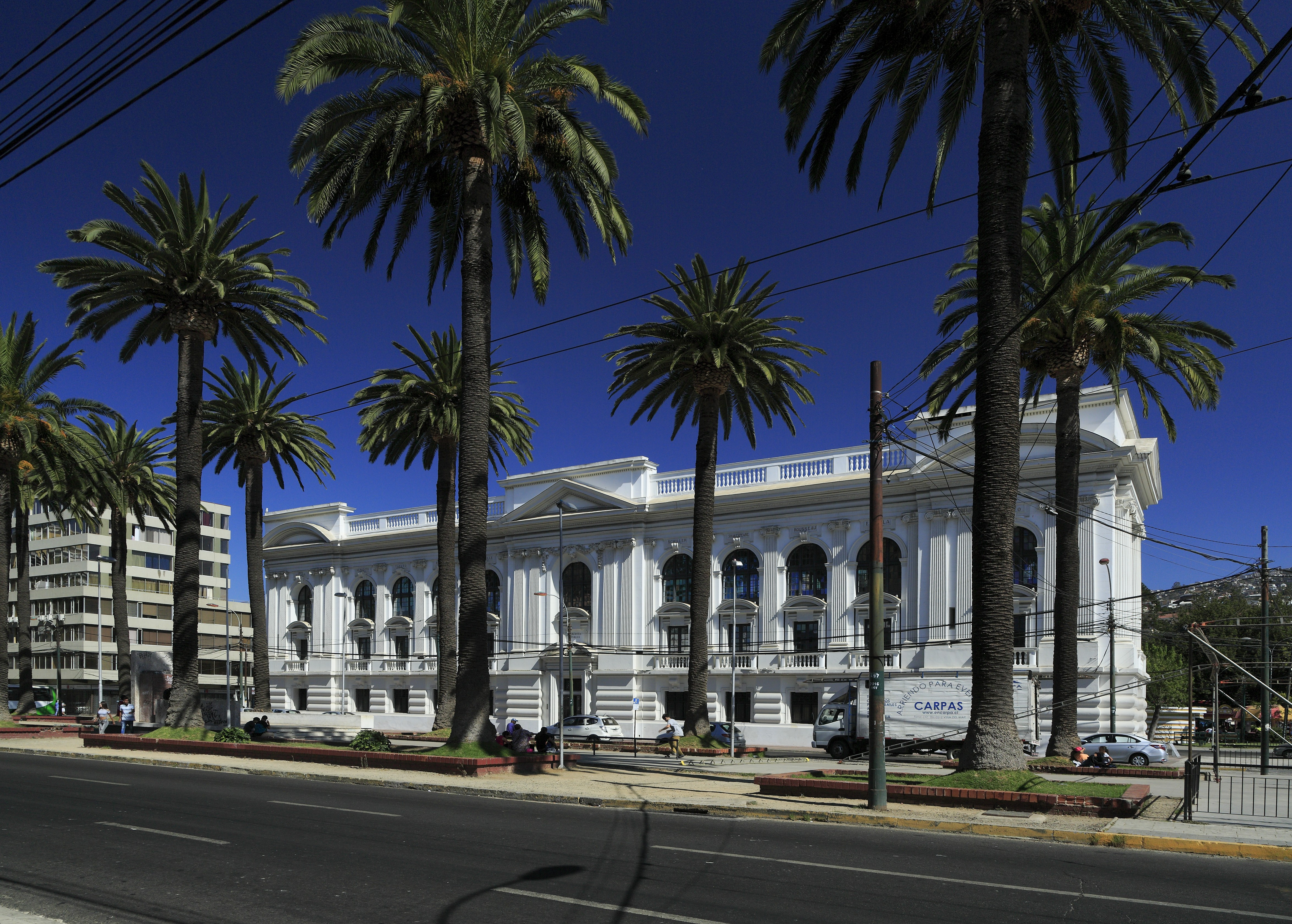 »Biblioteca Santiago Severín«, das Gebäude ohne Kraftfahrzeuge im Vordergrund zu fotografieren ist aufgrund der Verkehrsdichte gar nicht so einfach.